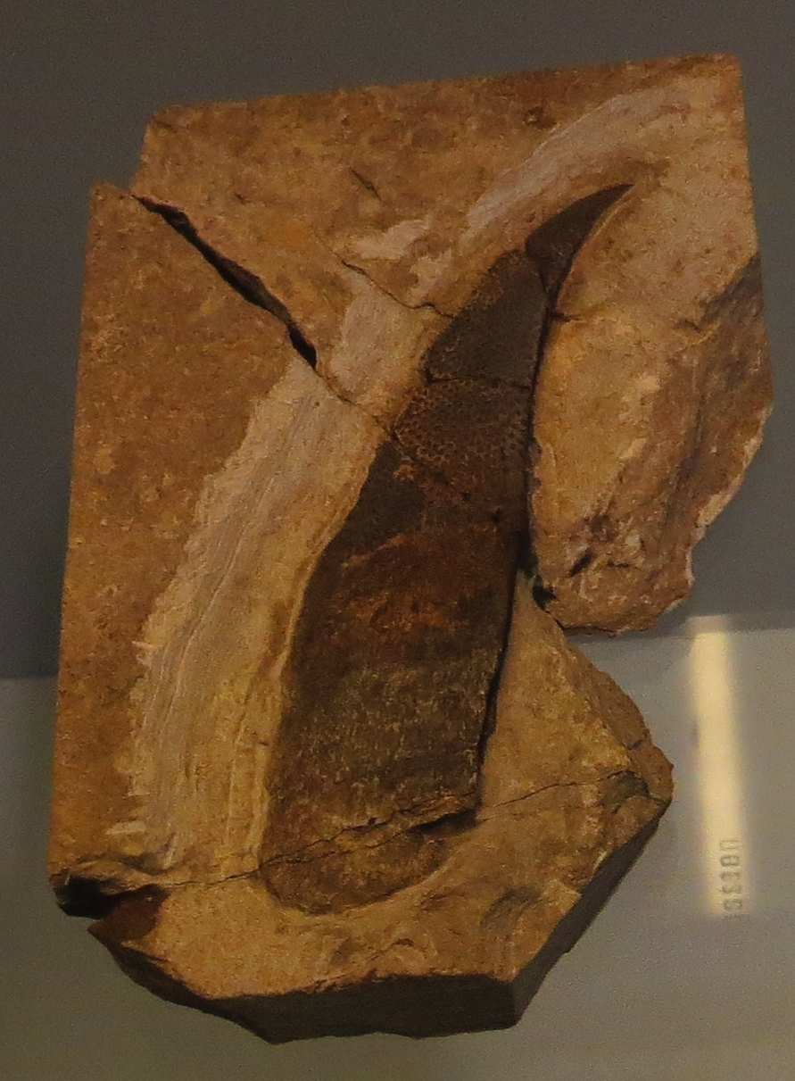 Fossil - Took the picture at Museum of Natural History Zurich